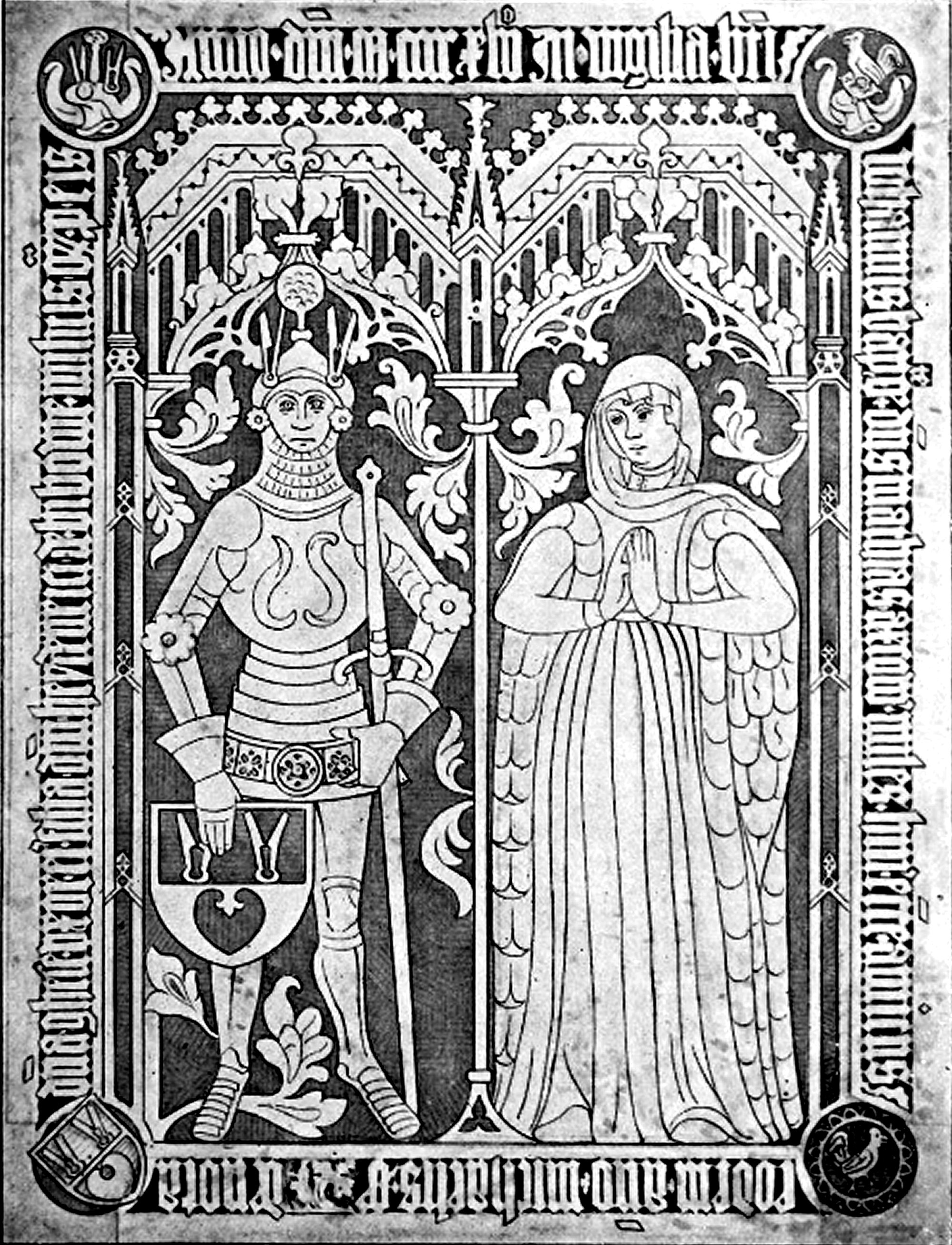 Grabplatte Matthias v. Axekow im Doberaner Münster aus Friedrich Schlie Band III.